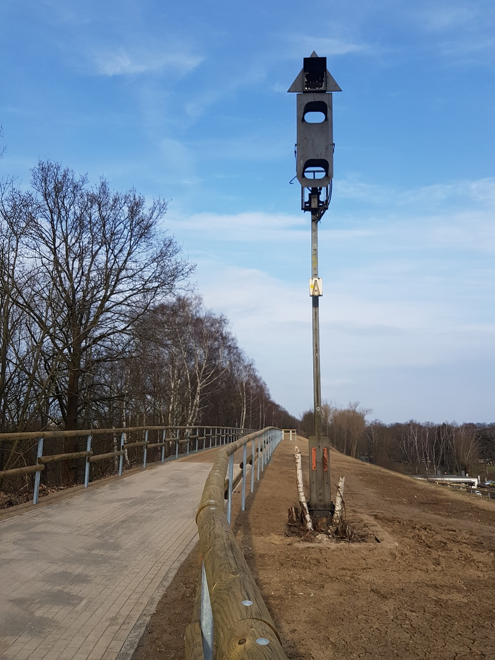 Ehemaliges Signal am Braunschweiger Ringgleis in Höhe des Kennelwegs